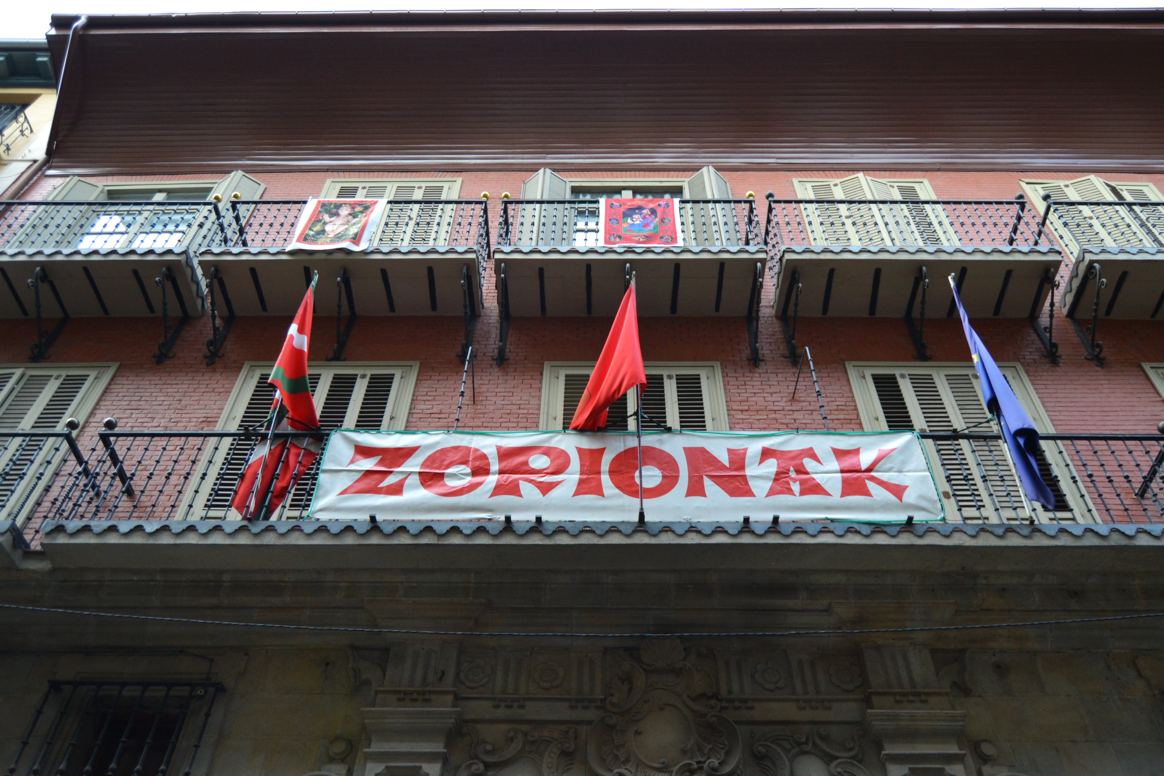 Navarro-Tafallatarren jauregia. Zapateria kalean, badira hainbat jauregi barroko eta etxe armarridun ugari, kale honek XVIII mendean hartu zuen garrantzi sozialaren isla, hain zuen. Eraikin hau daukagu horietan interesgarrienetakoa. Juan Navarro merkatariak agindu zuen eraikitzea, bere aberastasunaren eta boterearen ikur gisa. XVIII. mendearen bigarren aldikoa da. Barne aldean eskailera eta bi gorputzeko ezkaratz gangaduna gorde dira. Ganga erditik behera, landare-floroi bat dago zintzilik. Lurzoruaren estaldura errekariz, hezurrez eta astragaloz egina dago, eta horiek denek lore-motibo bitxia osatzen dute.